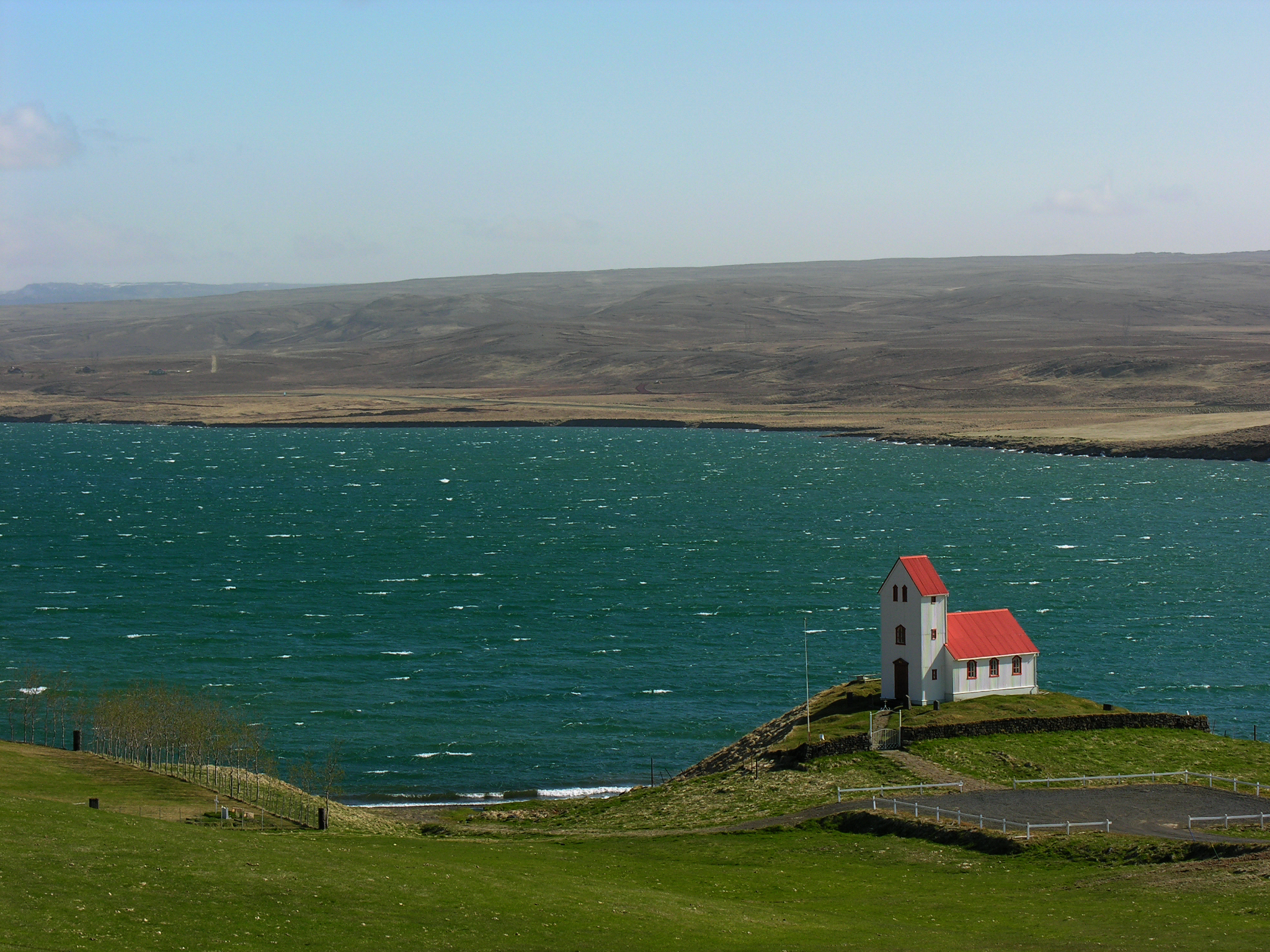 Iceland, Úlfljótsvatn